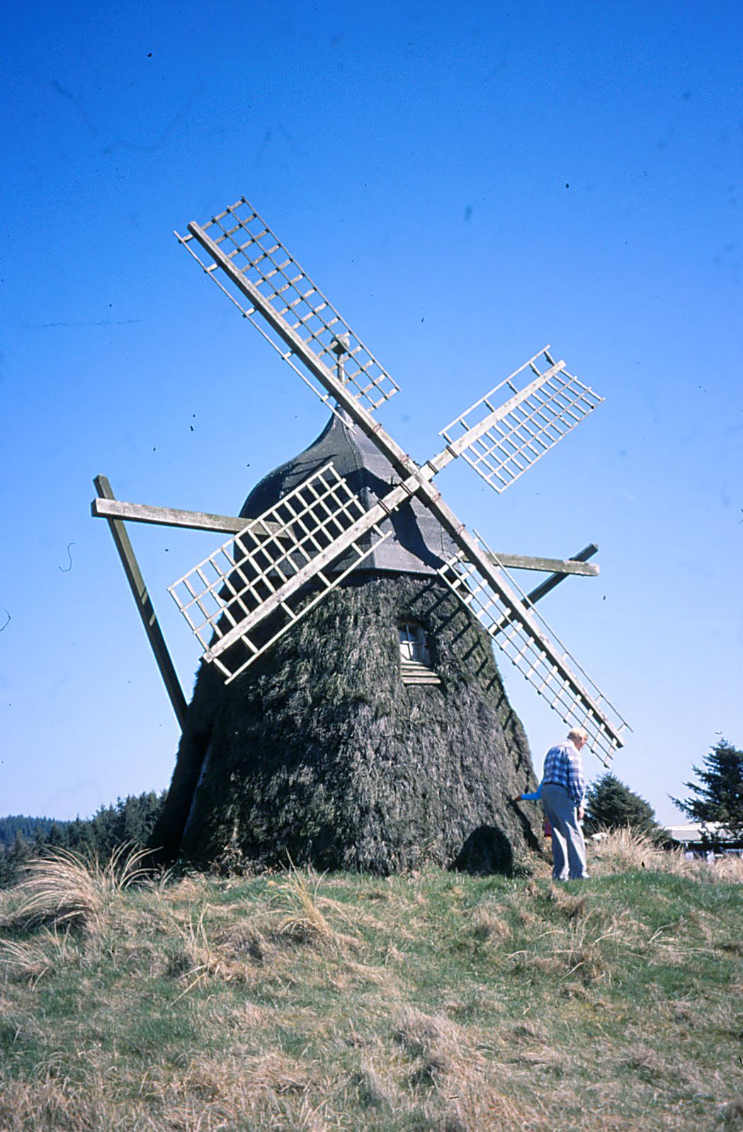 Danmarks eneste lyngbeklædte mølle, ligger ved Grønnestrand.